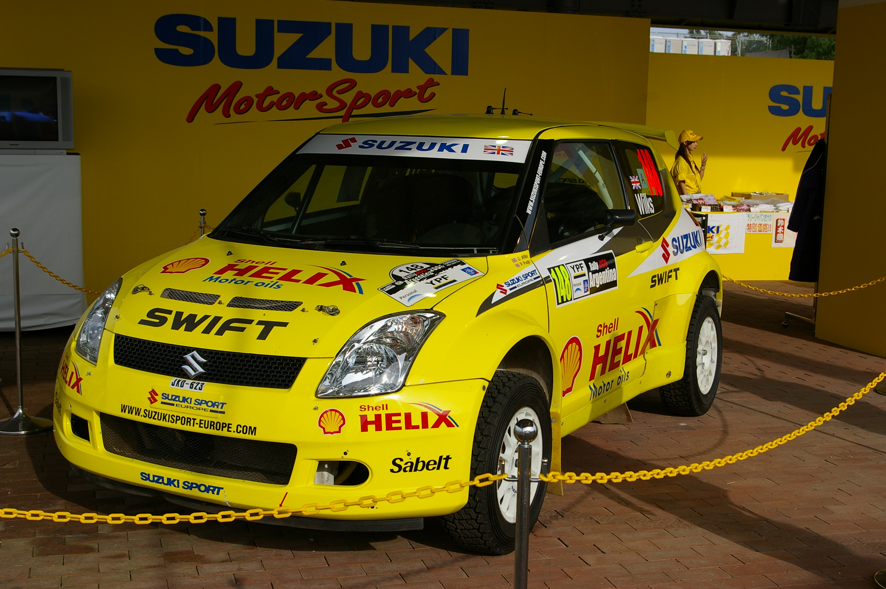 Suzuki Swift JRC version.